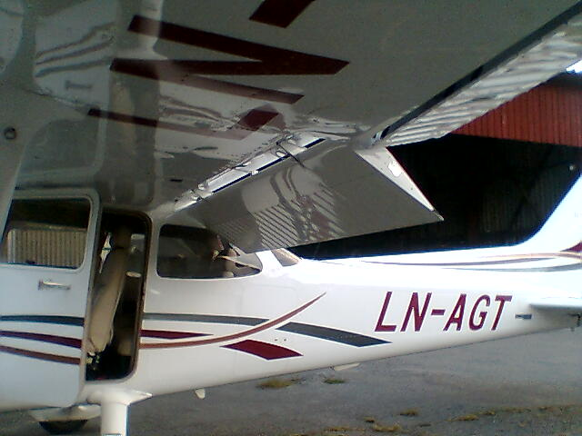 Cessna 172 flaps